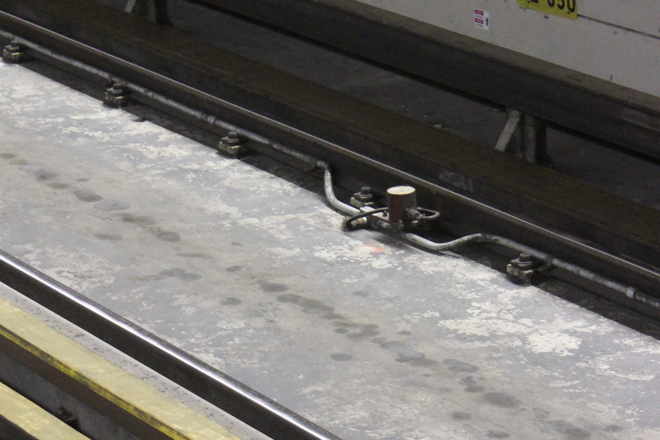 balise de freinage automatique du métro de Montréal